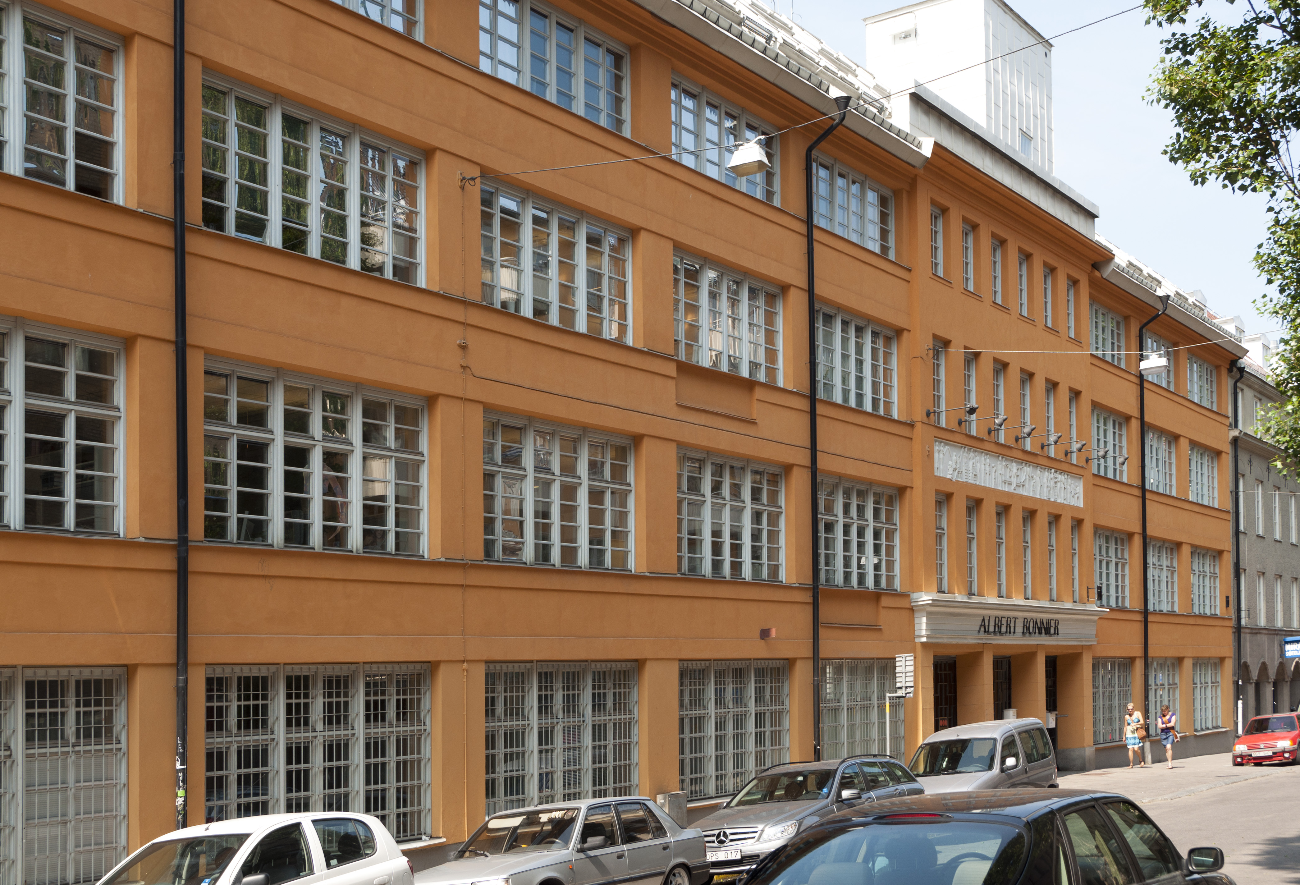 Moraset 22, Luntmakargatan 39-45. Byggnadsår Byggnadsår 1927-29, arkitekt Mauritz Dahlberg, fasadutforming av Rolf Bolin, byggherre Albert Bonnier, byggmästare Olle Engkvist.